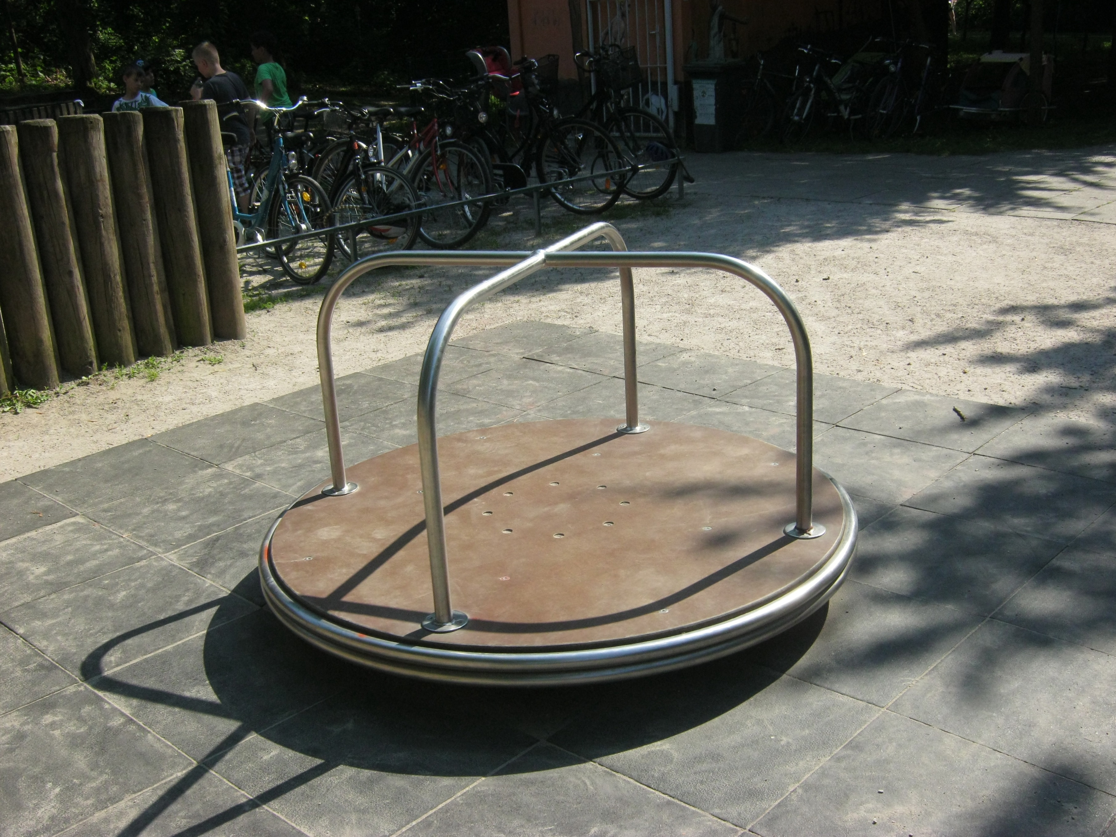 Ein Spielplatzkarussell am Robinsonspielplatz Fasanengarten in Karlsruhe